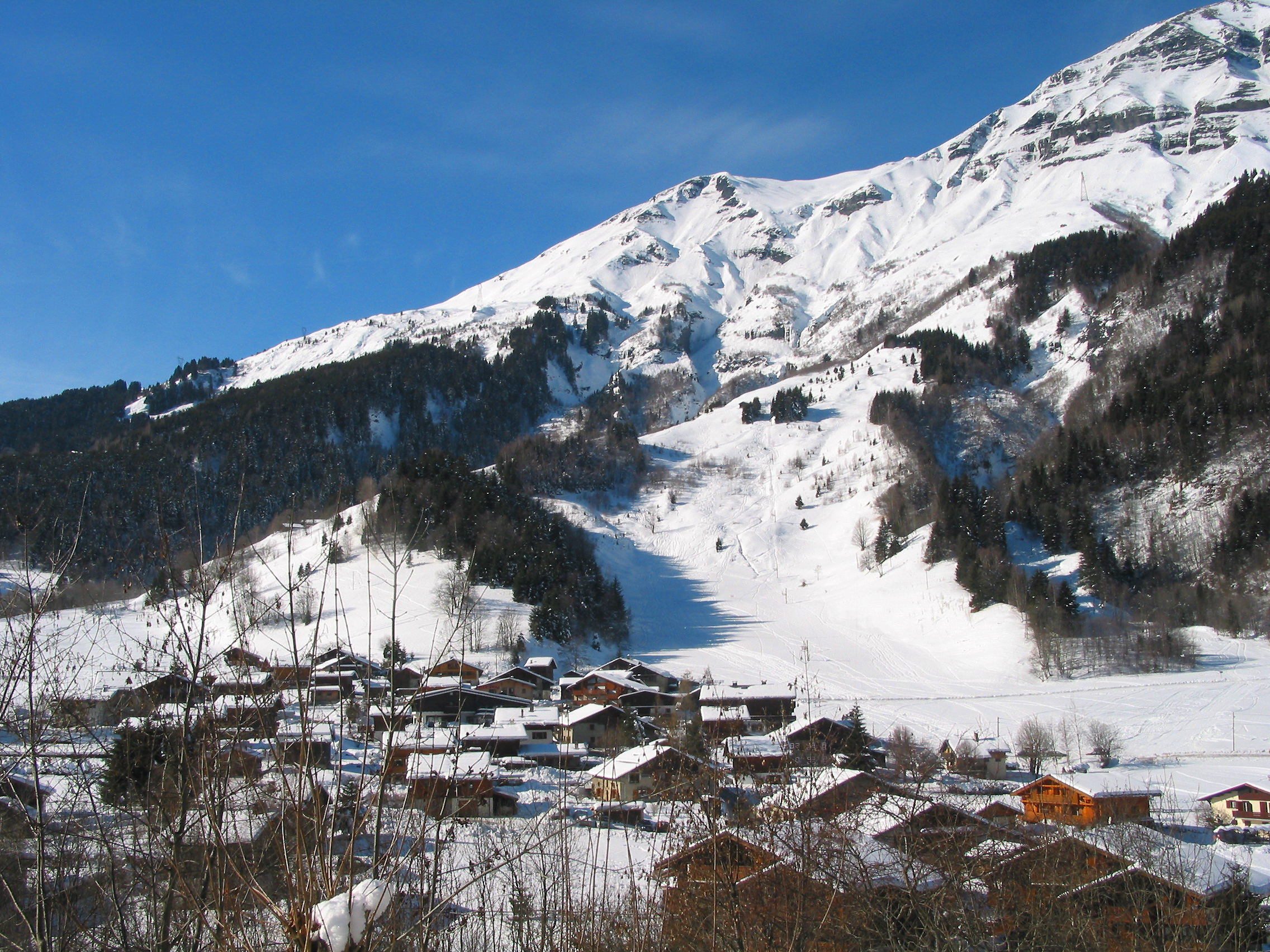 Les Contamines-Montjoie (Haute-Savoie - France), pistes de ski du Mont Joly.